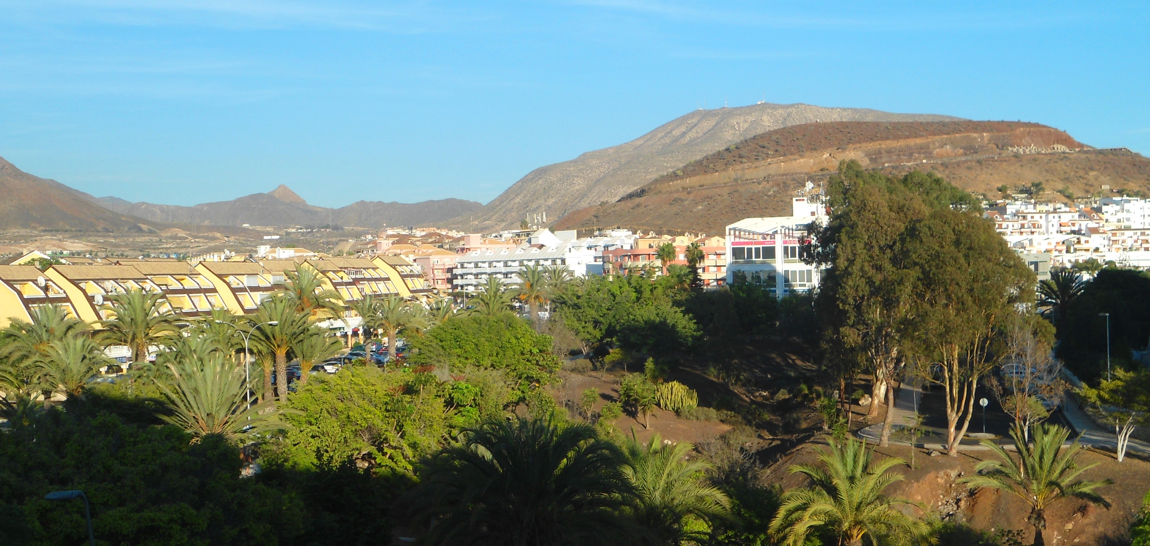 Playa de Las Americas